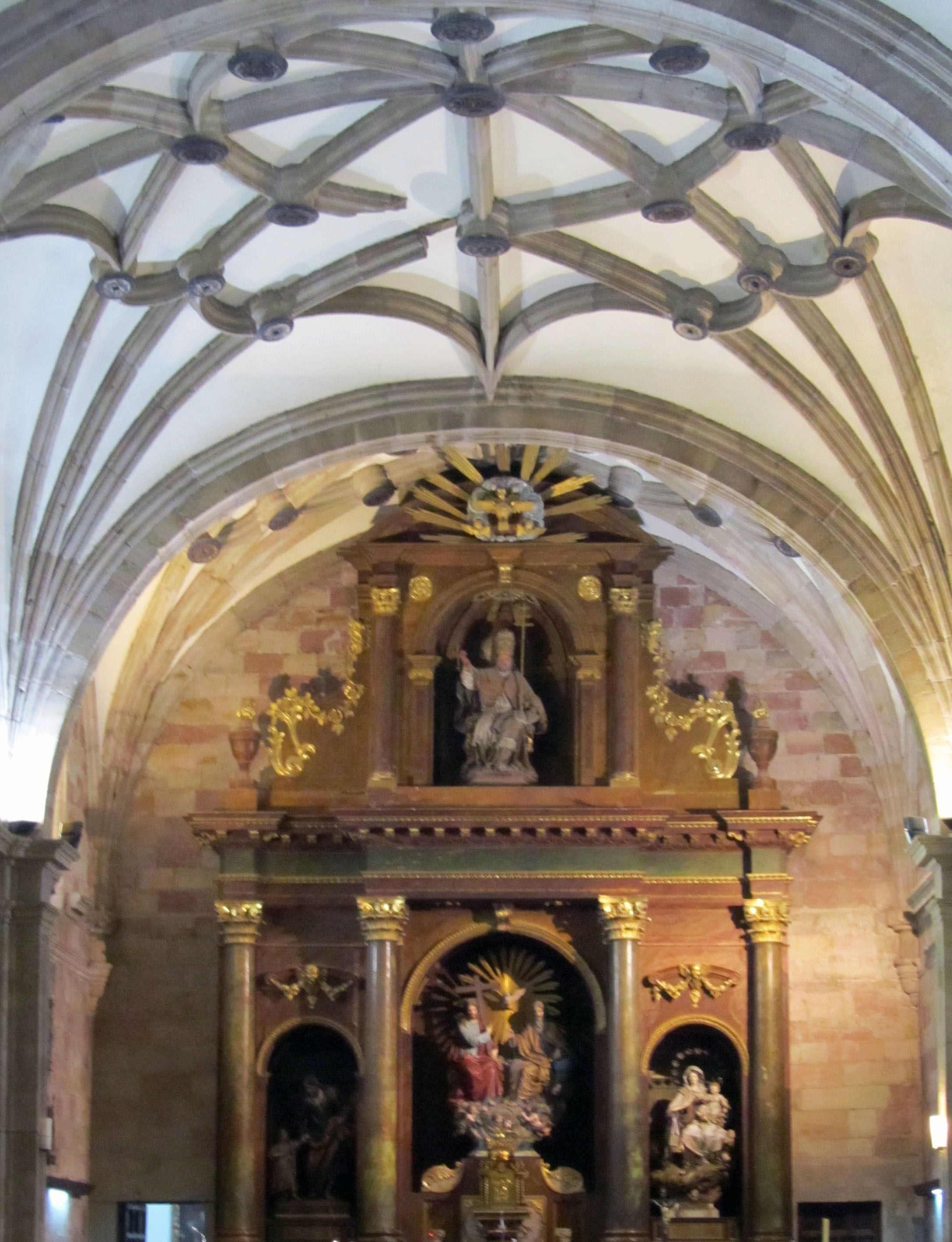 Altar de la capilla de San Pedro en la catedral de Sigüenza.Spain